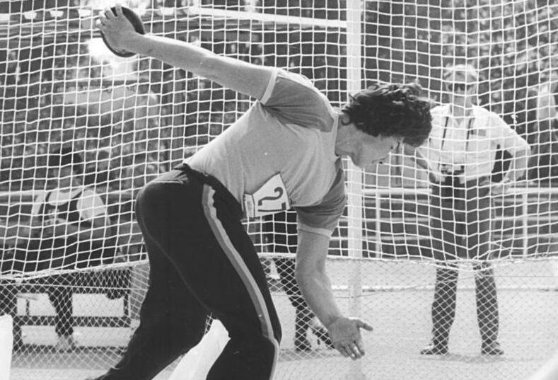 Gisela Beyer ADN-ZB Bartocha 22.5.83 Neubrandenburg: DVfL-Sportfest Herausragende 70,40 m erreichte Diskuswerferin Gisela Beyer am 21.5.83 bei einem Leichtathletik-Sportfest im Neubrandenburger Jahn-Station. Die Potsdamer ASK-Sportlerin schob sich mit deiser Weite auf Platz sechs der "Ewigen" Weltbestenliste. Abgebildete Personen: Beyer, Gisela: Diskuswerferin, DDR